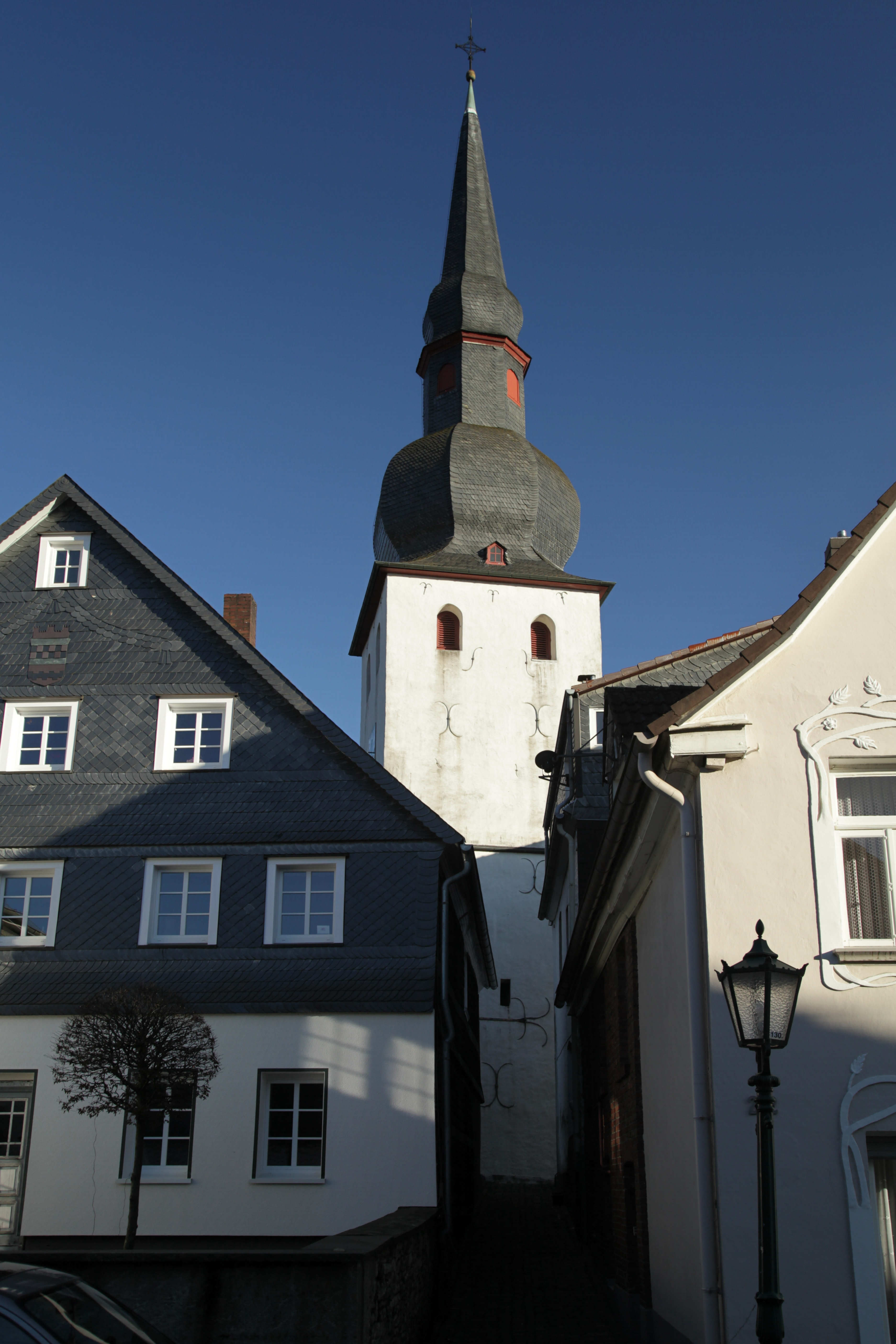 Hauptstraße in Bergneustadt